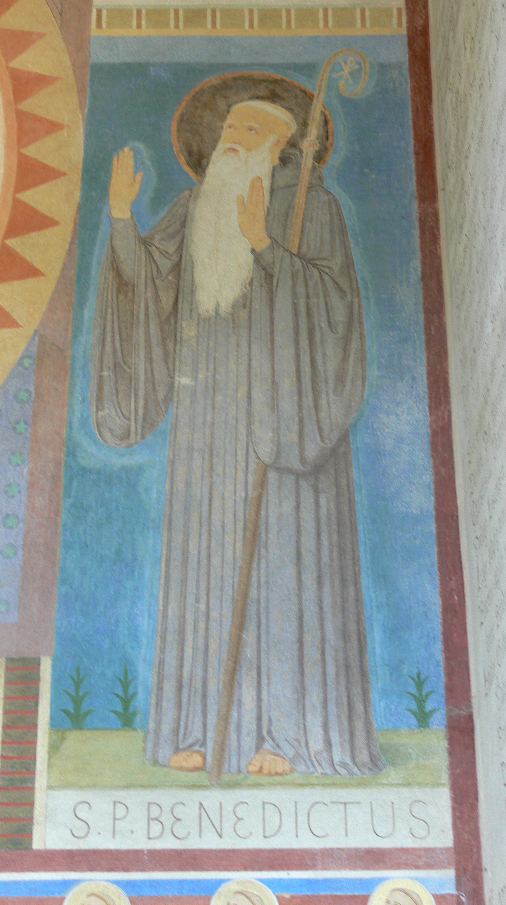 St.-Maurus-Kapelle, Beuron (Donautal), erbaut 1868–1870, Architekt: Desiderius Lenz, Maler: Gabriel Wüger Gabriel Wüger: Wandgemälde an der Fassade, Detail: Hl. Benedikt